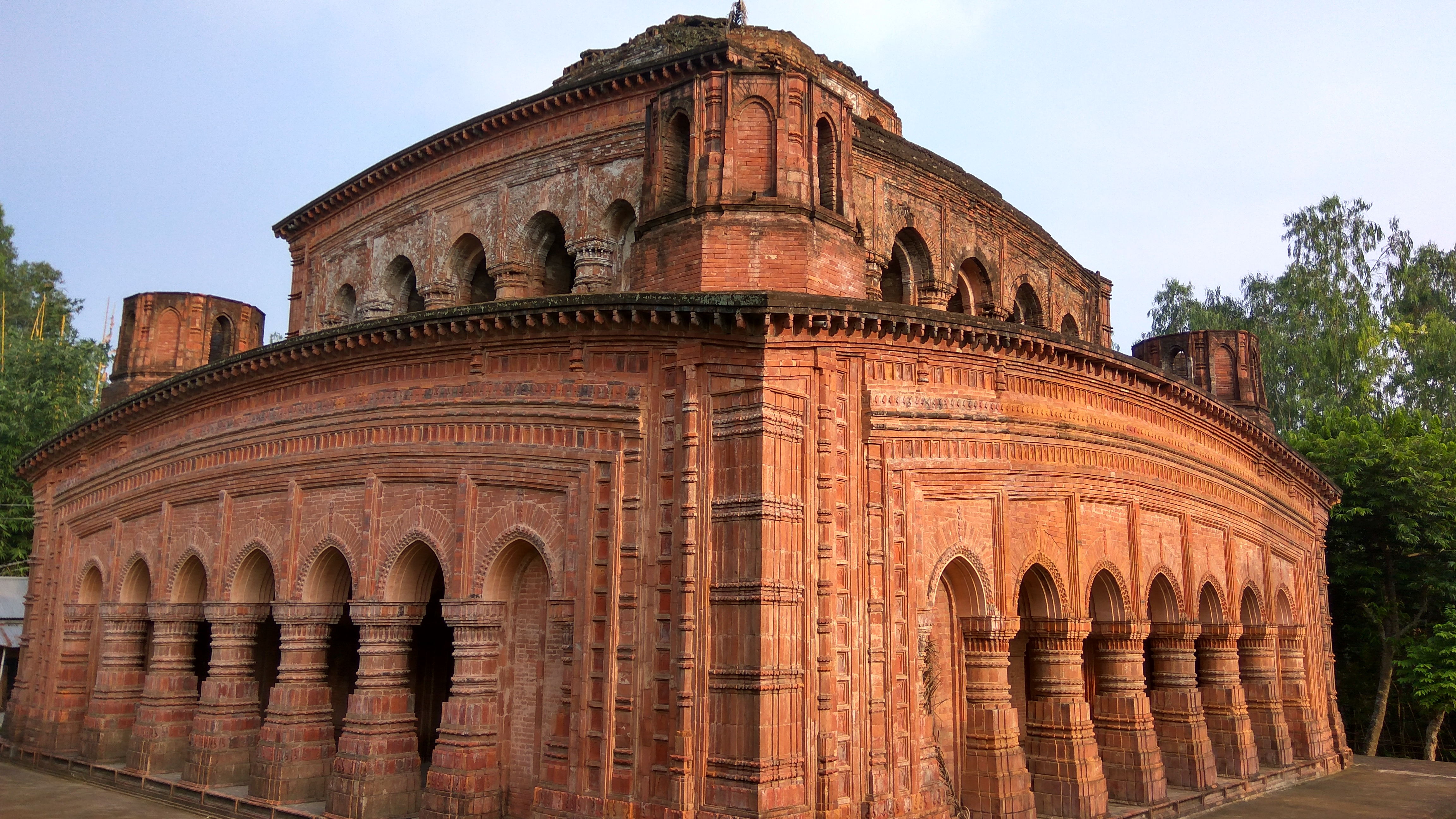 নবরত্ন মন্দির